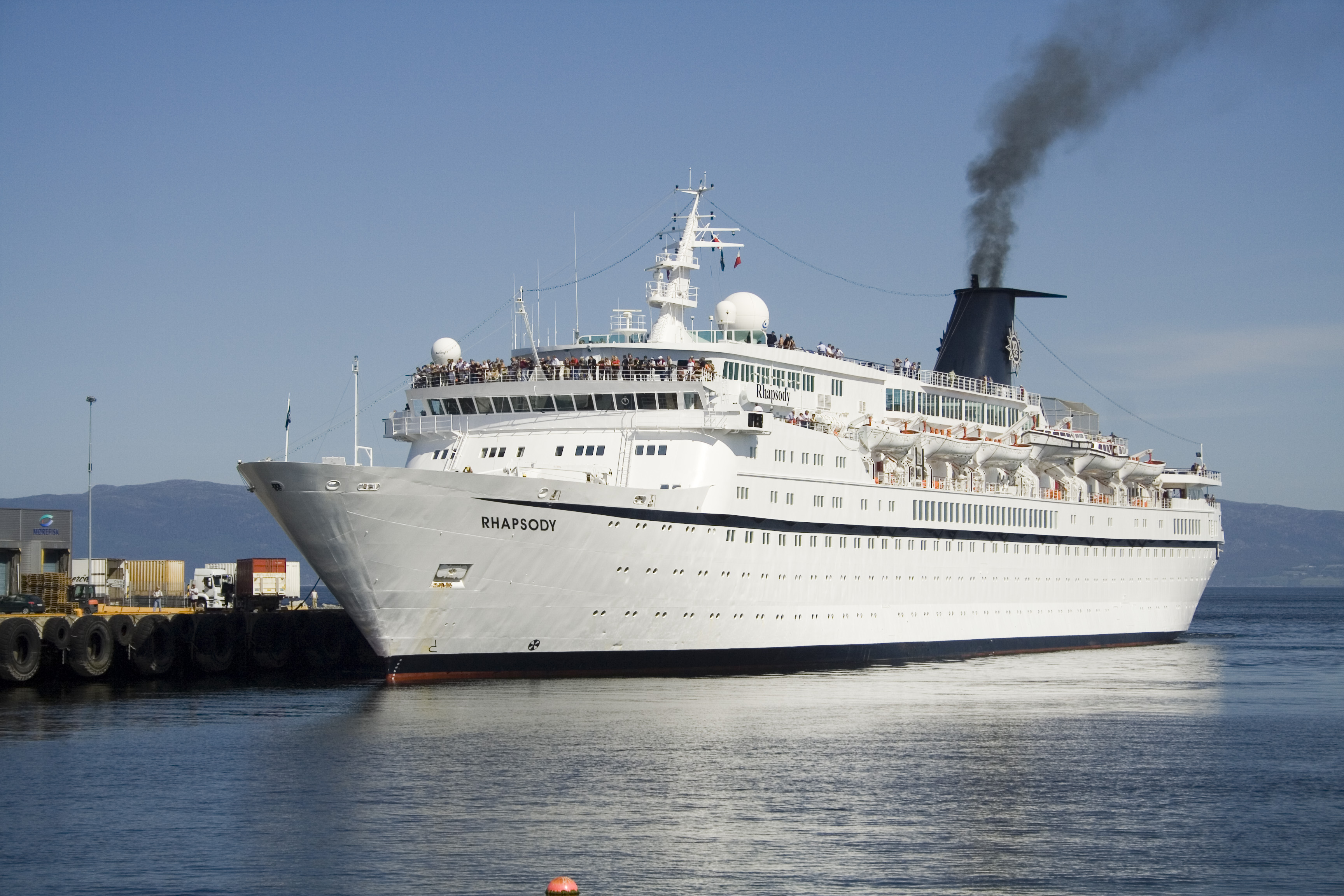 Rhapsody